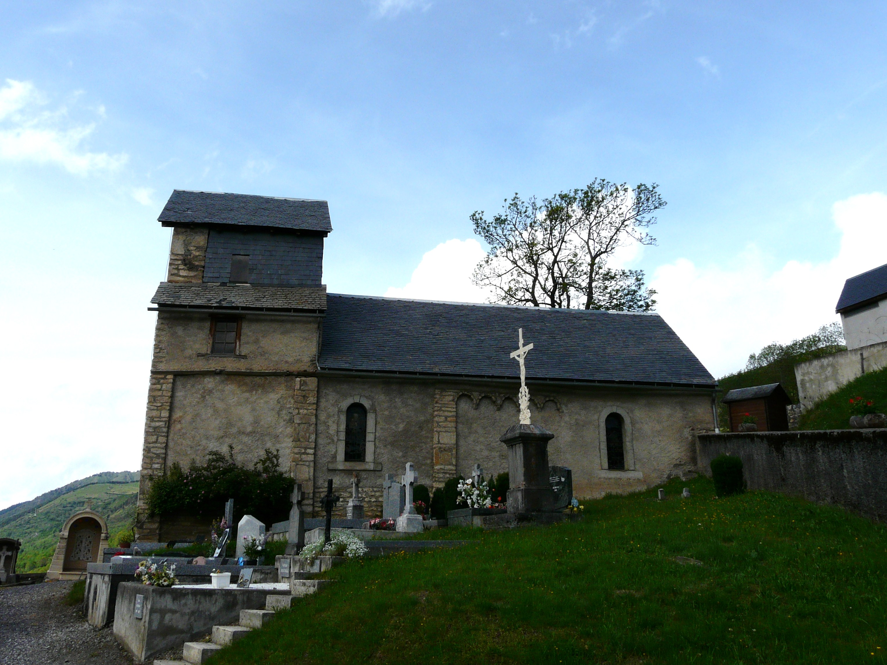 L'église Sainte-Marie-Madeleine, Loudervielle, Hautes-Pyrénées, France.